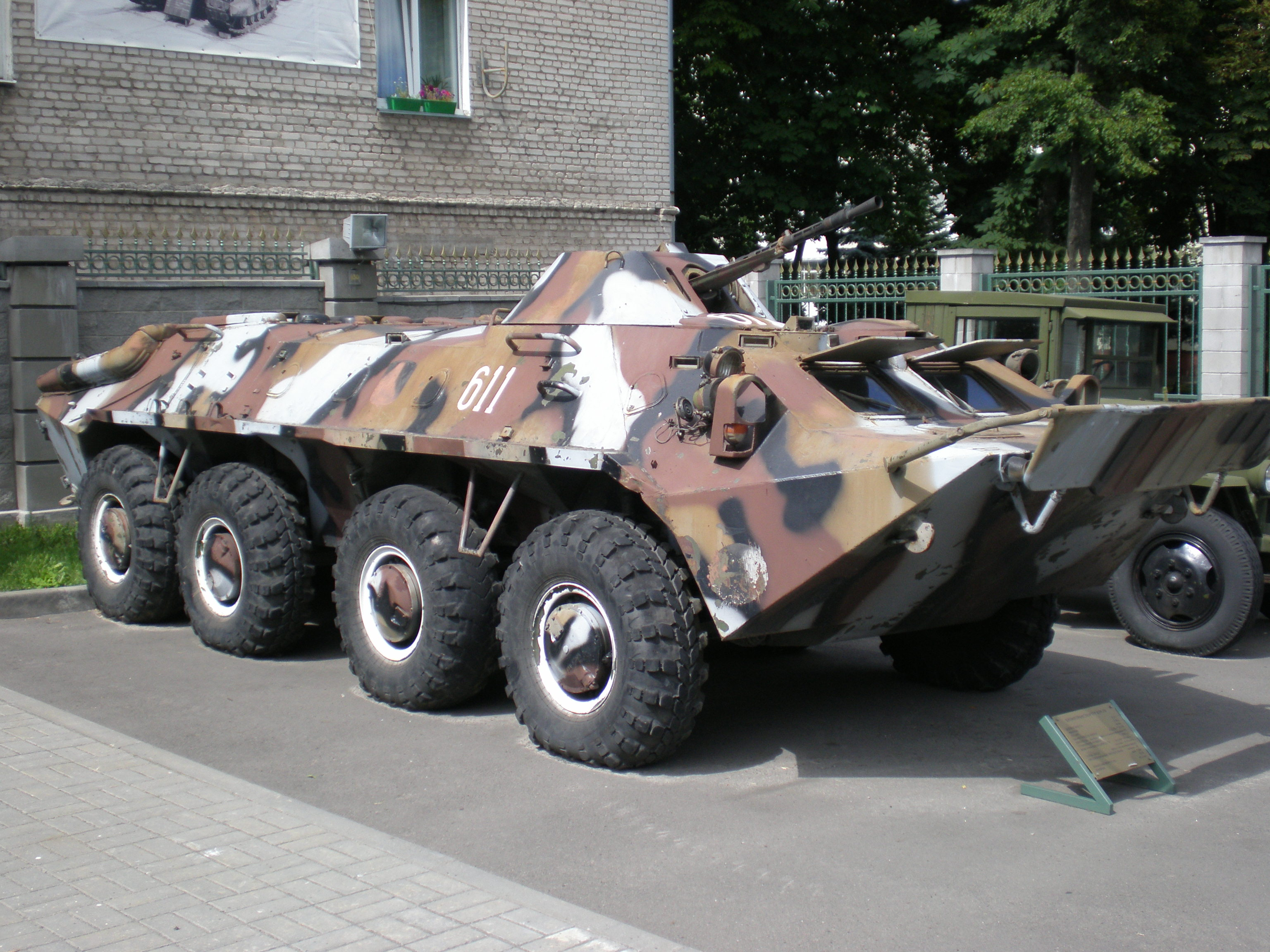 BTR-70 at a museum in Belarus.